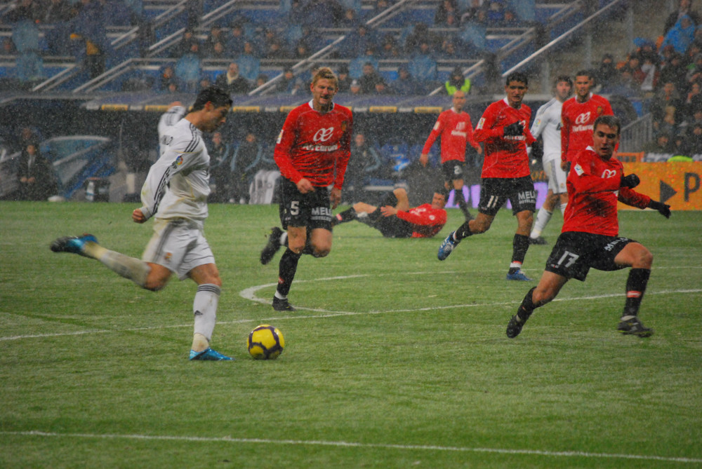 Partido con gran nevada Real Madrid 2 - Mallorca 0 Las fotos no tienen grano, es la nieve